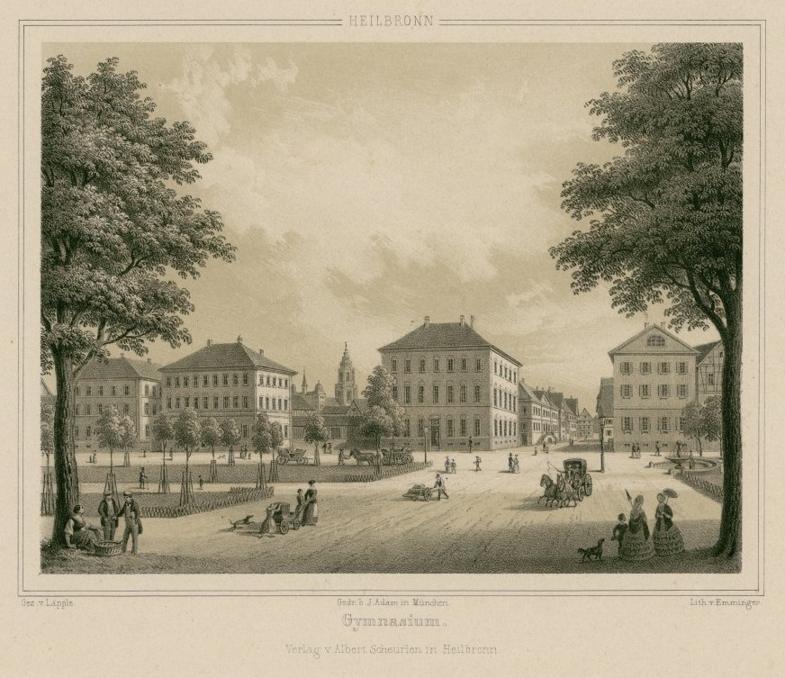 Heilbronn, Gymnasium. Lithographie, 13,5 × 17,9 cm. Gezeichnet von Johannes Läpple, lithographiert von Eberhard Emminger. Verlag von Albert Scheurlen, Heilbronn